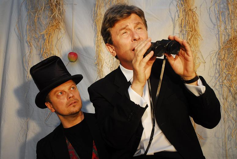 Tomasz Mędrzak i Piotr Szwedes, spektakt "Eksperyment Adam i Ewa", teatr tm.